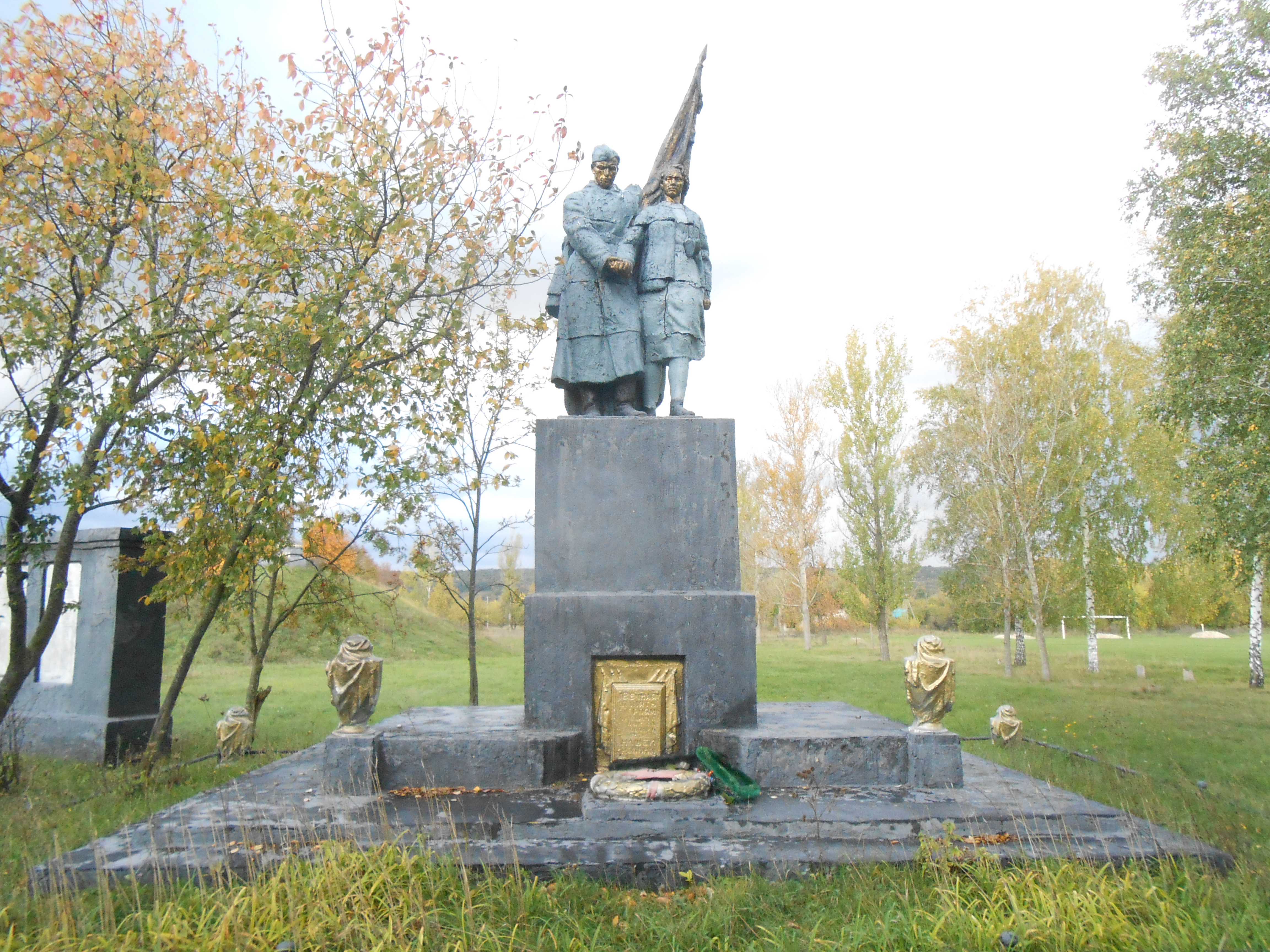 Холм Славы, памятный знак в честь погибших в годы Великой Отечественной войны (Белгородская область, Шебекино, село Купино)